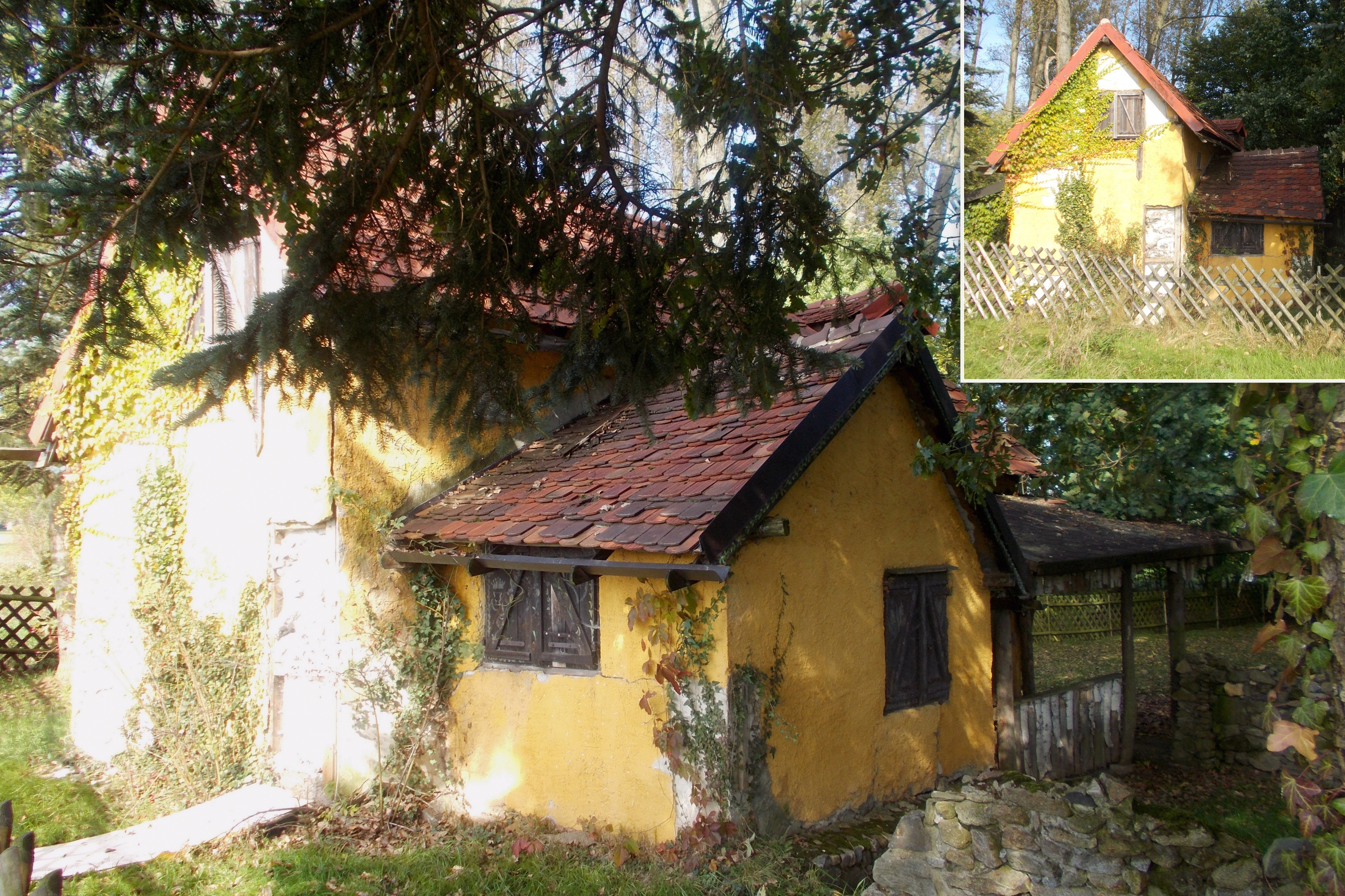 Dieses kleine Häuschen diente als Filmkulisse "Zollhäuschen" im DEFA-Film "Aus dem Leben eines Taugenichts" von 1973. Leider ist der Zustand 2014 am "einstürzen" - Schade.